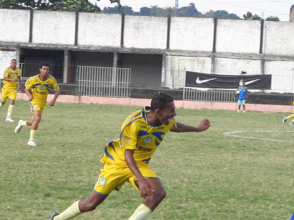 Duquecaxiense Futebol Clube